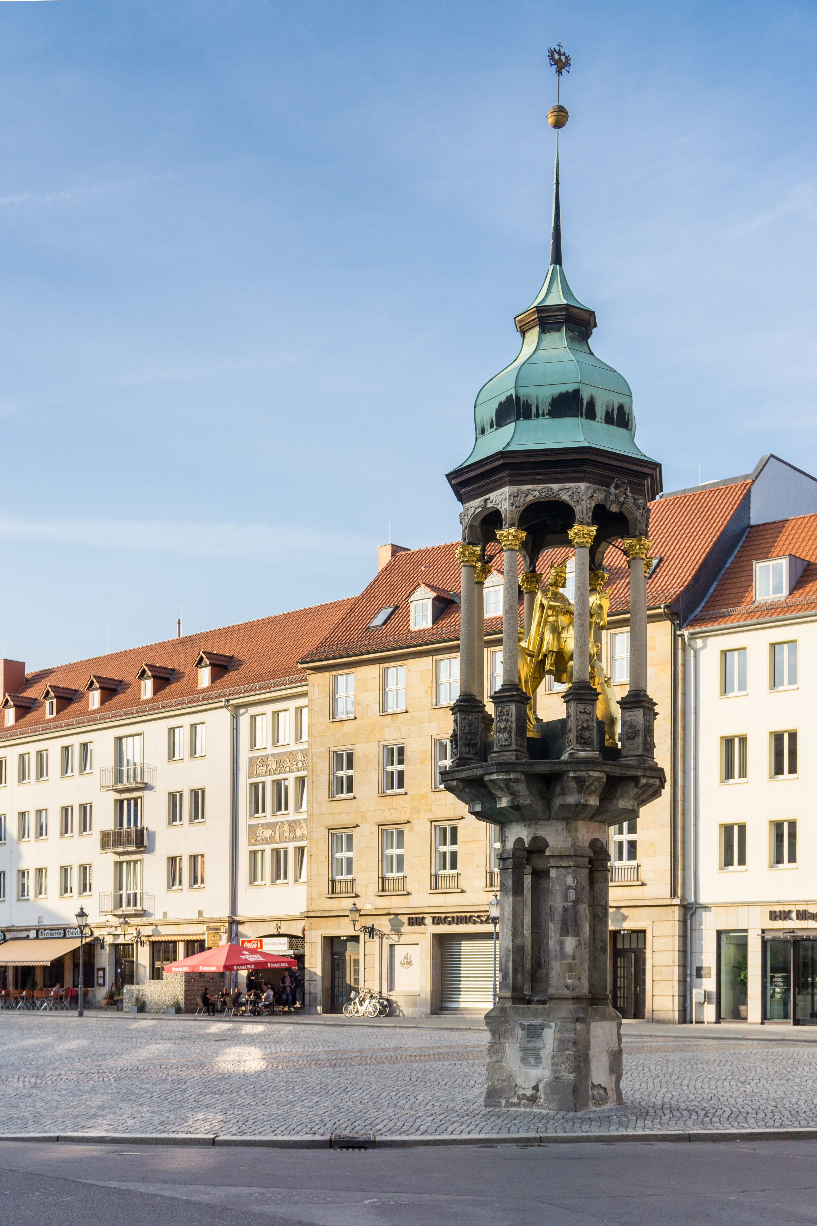 Magdeburger Reiter, Alter Markt in Magdeburg Stt Magdeburger Altstadt